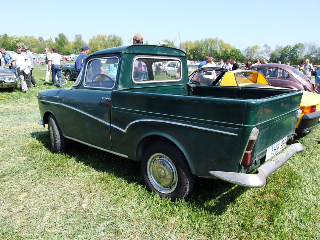 Quelle: selbst fotografiert, 04/2007 Fotograf: Späth Chr.